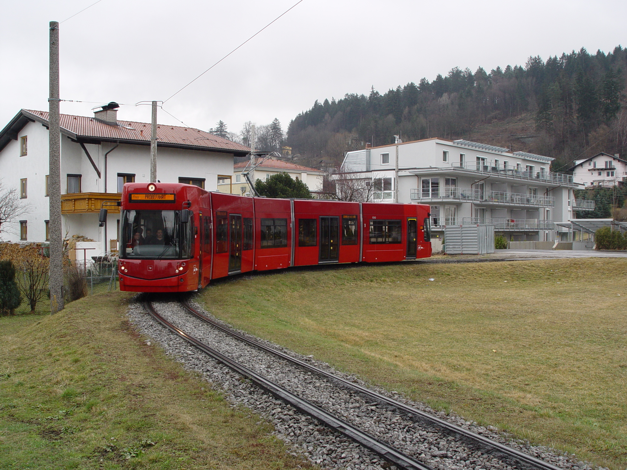 Triebwagen 351 der Straßenbahn Innsbruck in der alten Endschleife der Linie 3 in Amras.